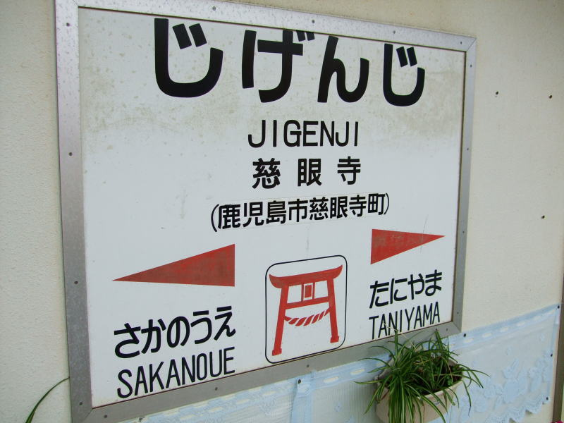 鹿児島県鹿児島市にあるJR指宿枕崎線慈眼寺駅 2007年8月13日 地図帳が撮影